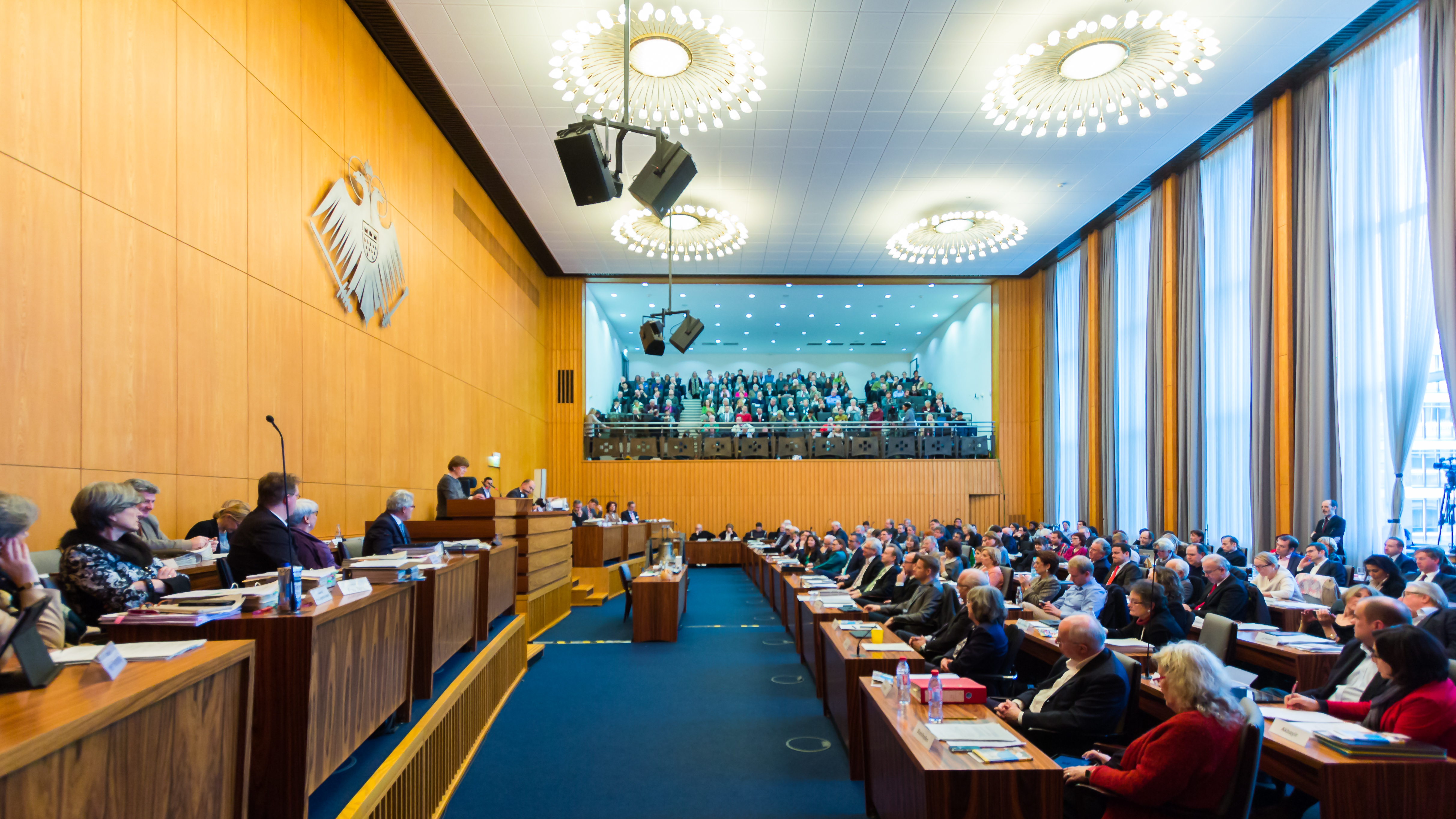 Vereidigung und Amtseinführung von Oberbürgermeisterin Henriette Reker